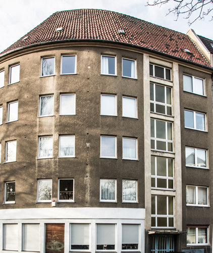 Wohnhaus von Johanna Krampen in der Dresdener Str. 61